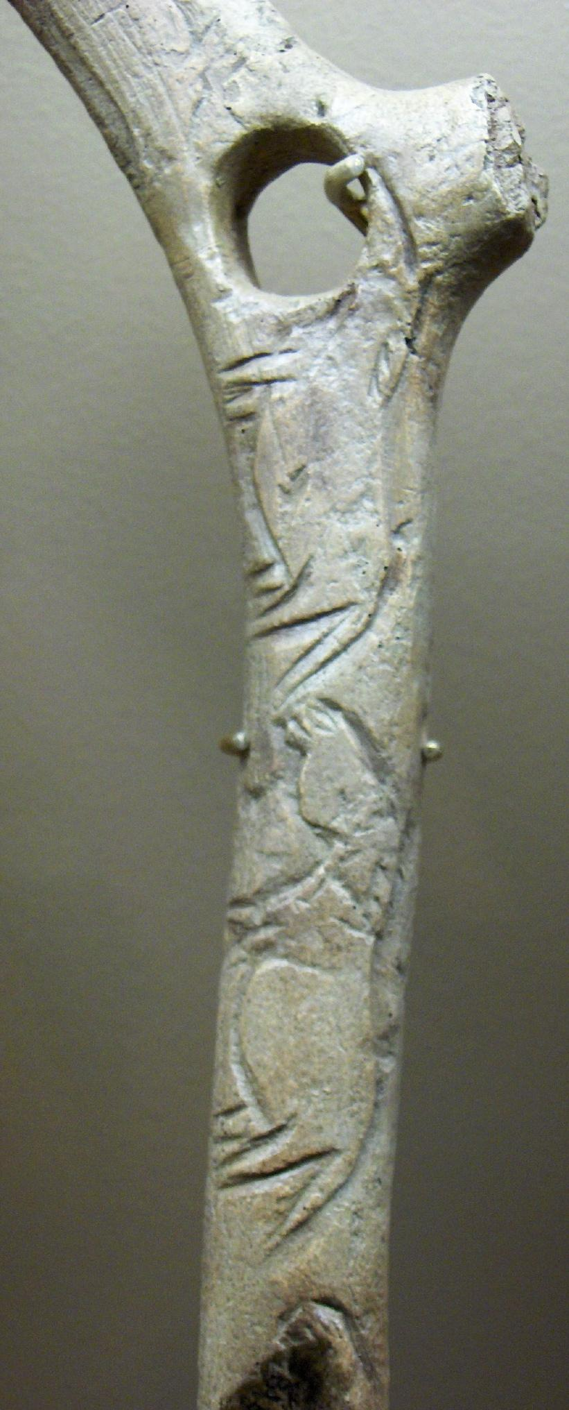 Bâton perçé gravé d’une file de chevaux, bois de renne, 31 cm, abri de La Madeleine (Tursac, Dordogne), vers 11 000 avant JC